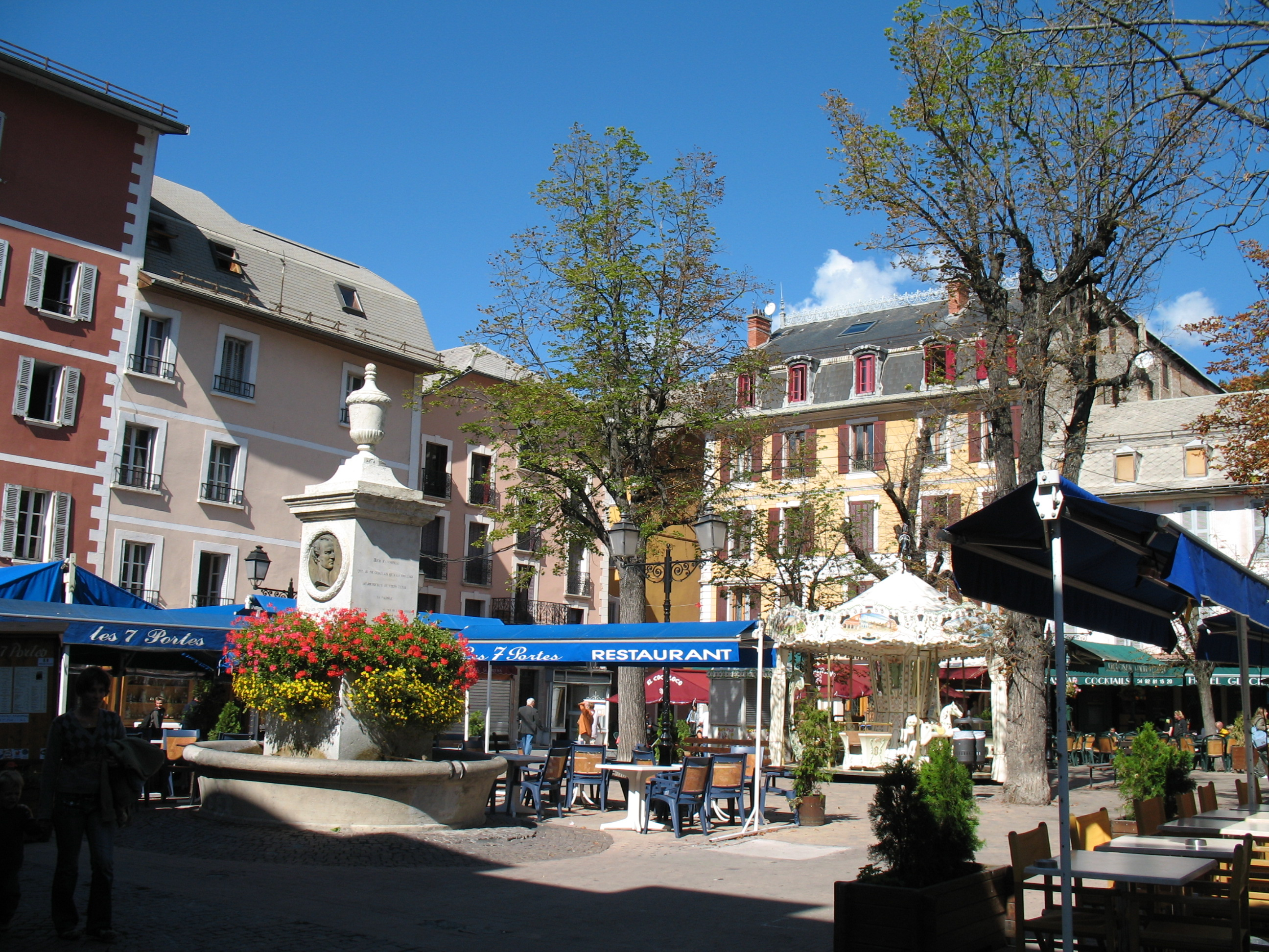 Barcelonnette, département des Alpes-de-Haute-Provence, France